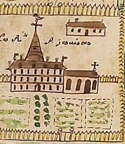 La Nouvelle Orléans. The Jesuit Convent in New Orleans, ca. 1735. French colonial Louisiana.